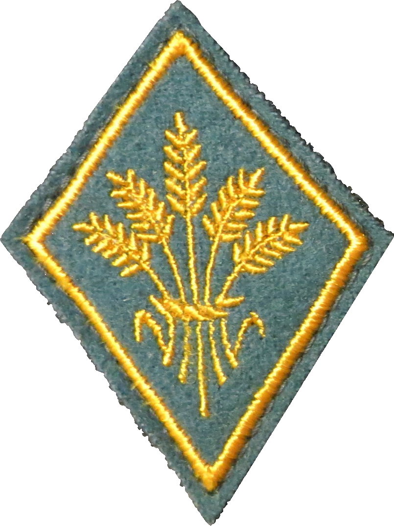 Abzeichen der Verpflegungstruppen Schweiz (Zeughaus SH)